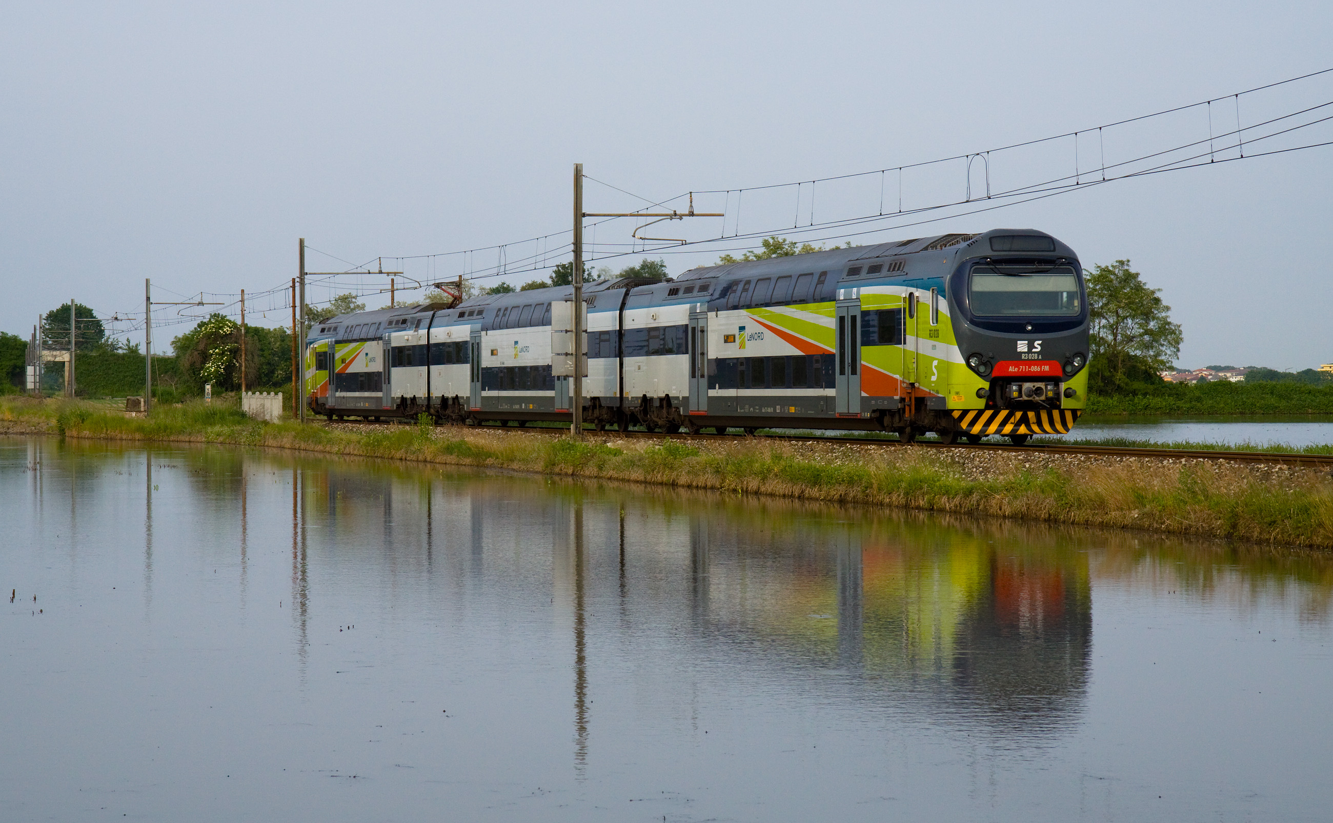 Elettrotreno TSR delle Ferrovie Nord Milano in corsa presso Galliate